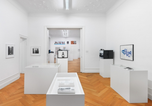 Ausstellungsraum in der Fasanenstraße (Berlin). Zu sehen: Pictures, Before and After – An Exhibition for Douglas Crimp (2014)